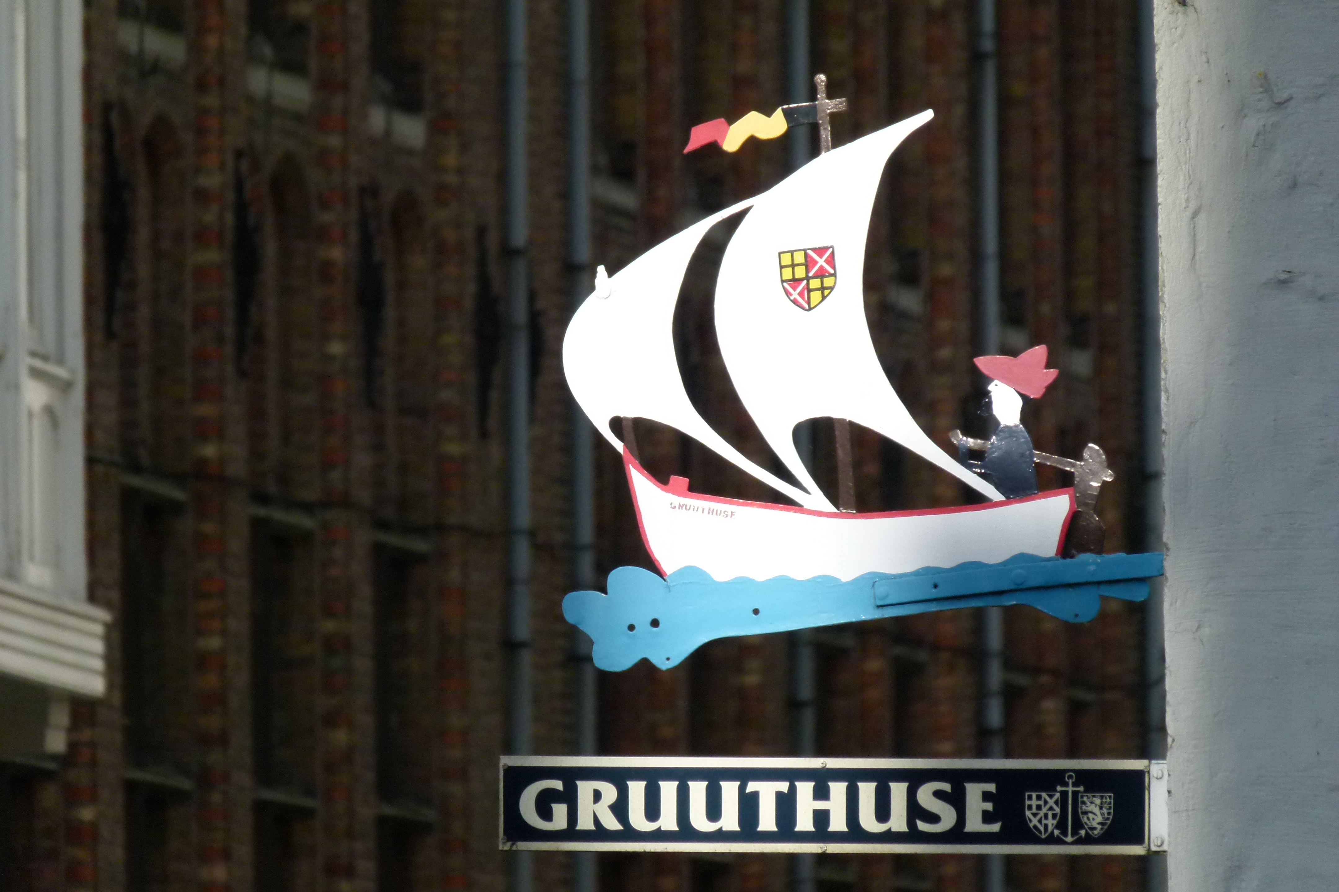 enseigne du Gruuthusemuseum e Bruges